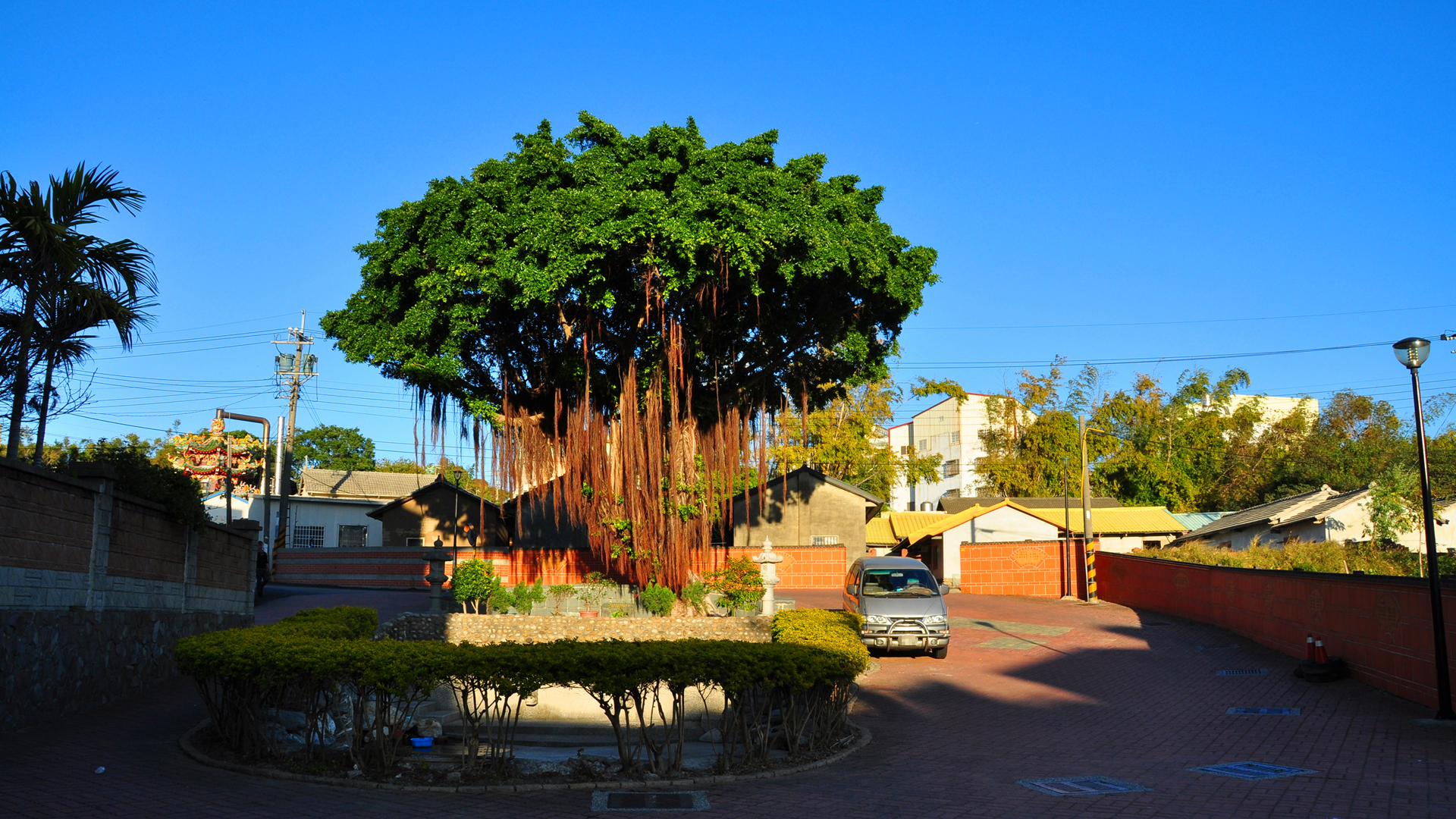 自從2013年5月30日後另一棵老榕樹傾倒後的龍目井現況。